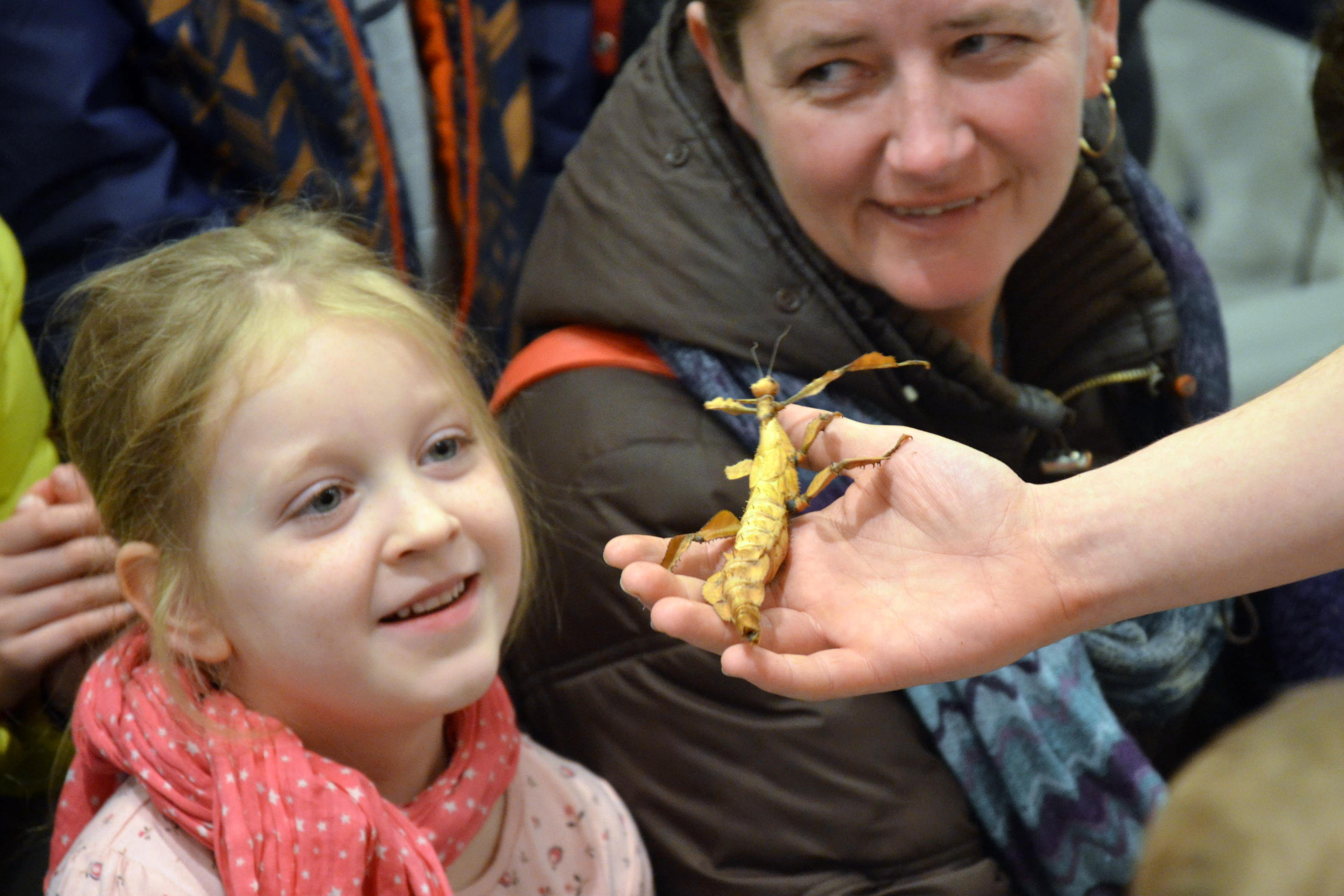 Reptilia